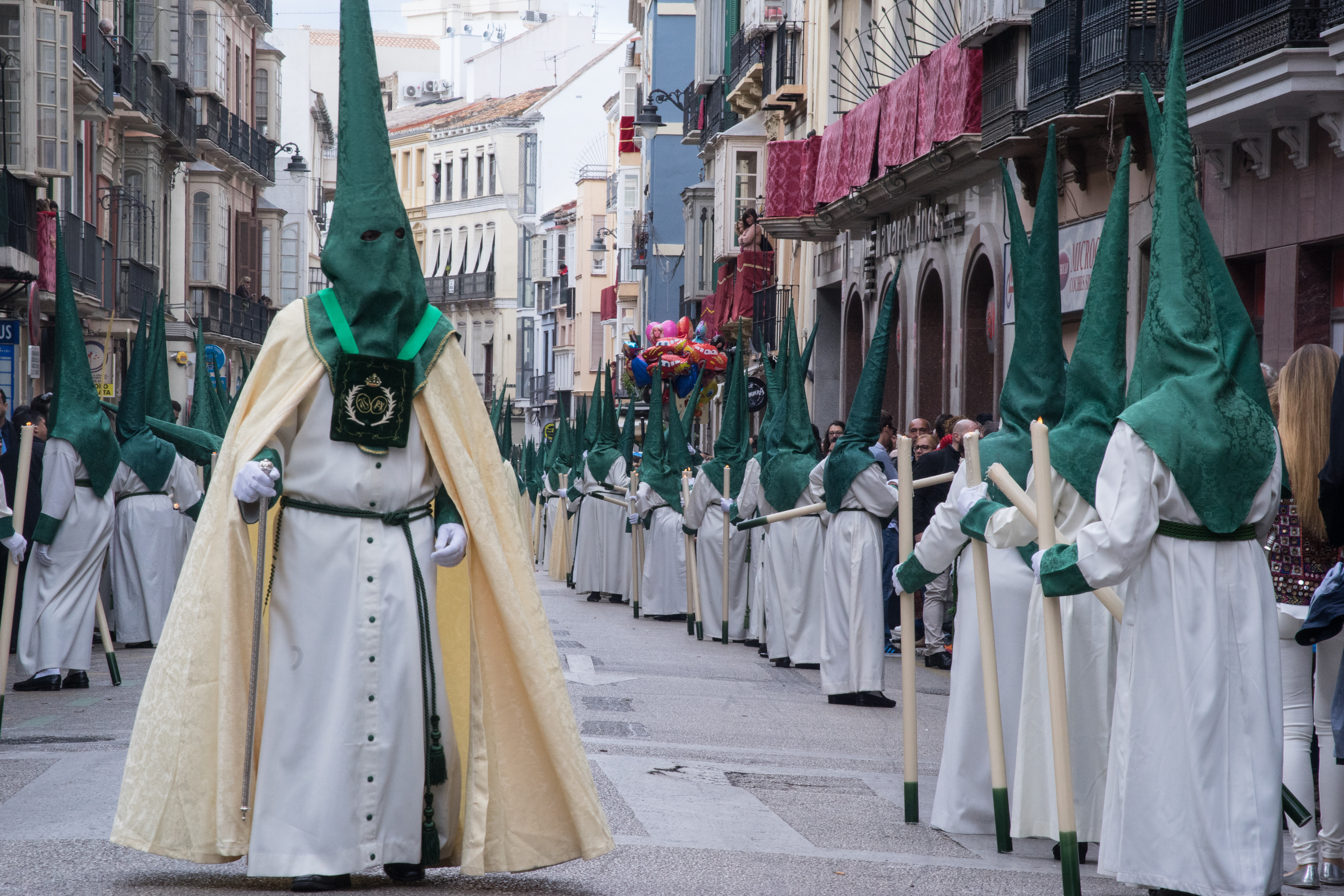 MAyordomo de la Real Cofradía de Nuestro Padre Jesús a su Entrada en Jerusalén y María Santísima del Amparo. Trono del Amparo. This is a photography of a Folklore festival in Spain (Wikidata id Q9075883).